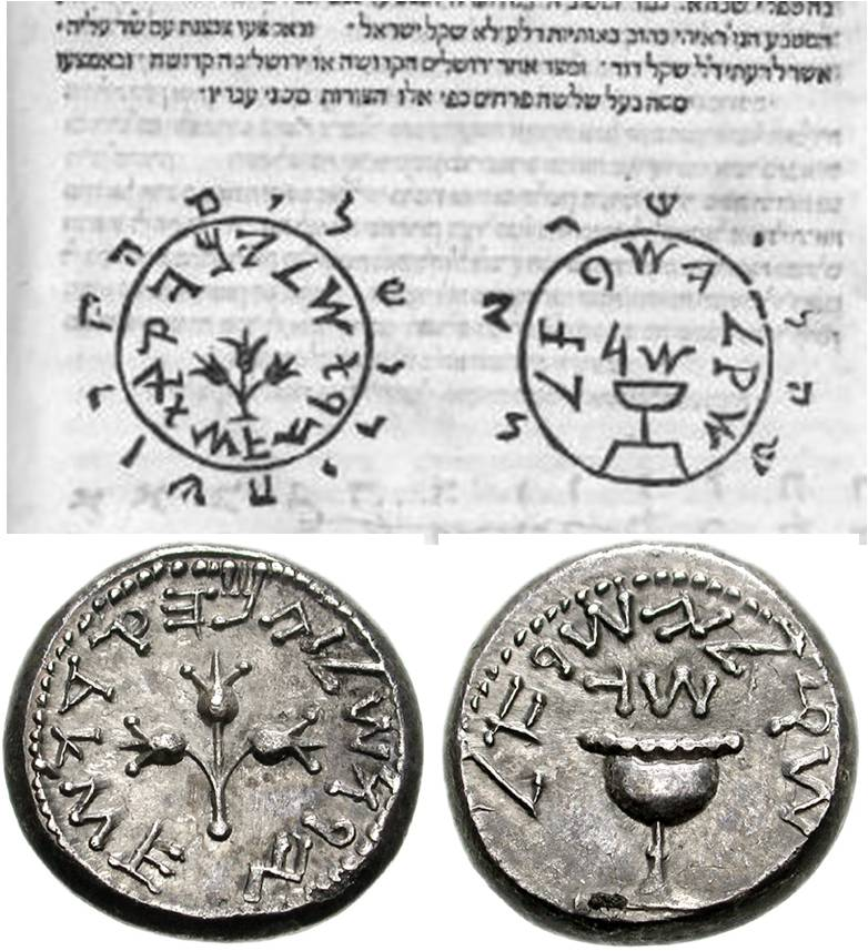 תרשים של מטבע עם כתובת בכתב עברי עתיק במהדורה הראשונה של הספר "מאור עיניים" לרבי עזריה מן האדומים, שהודפסה בחיי המחבר בשנת 1574. מתחת לתרשים: תצלום של המטבע המקורי.